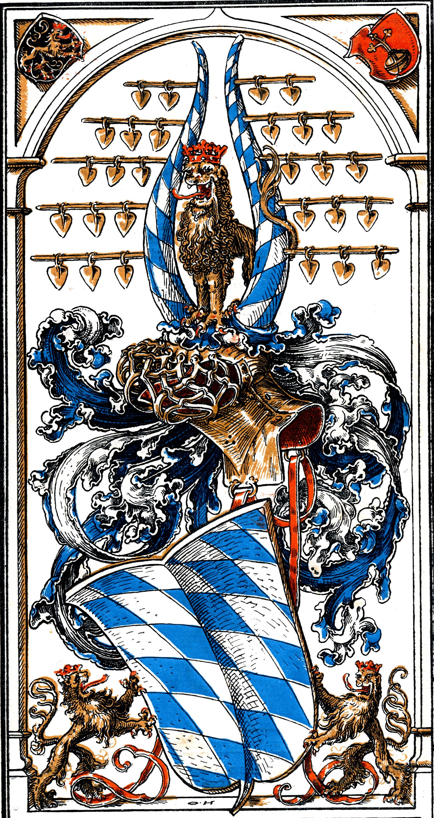 Stammwappen der Wittelsbacher